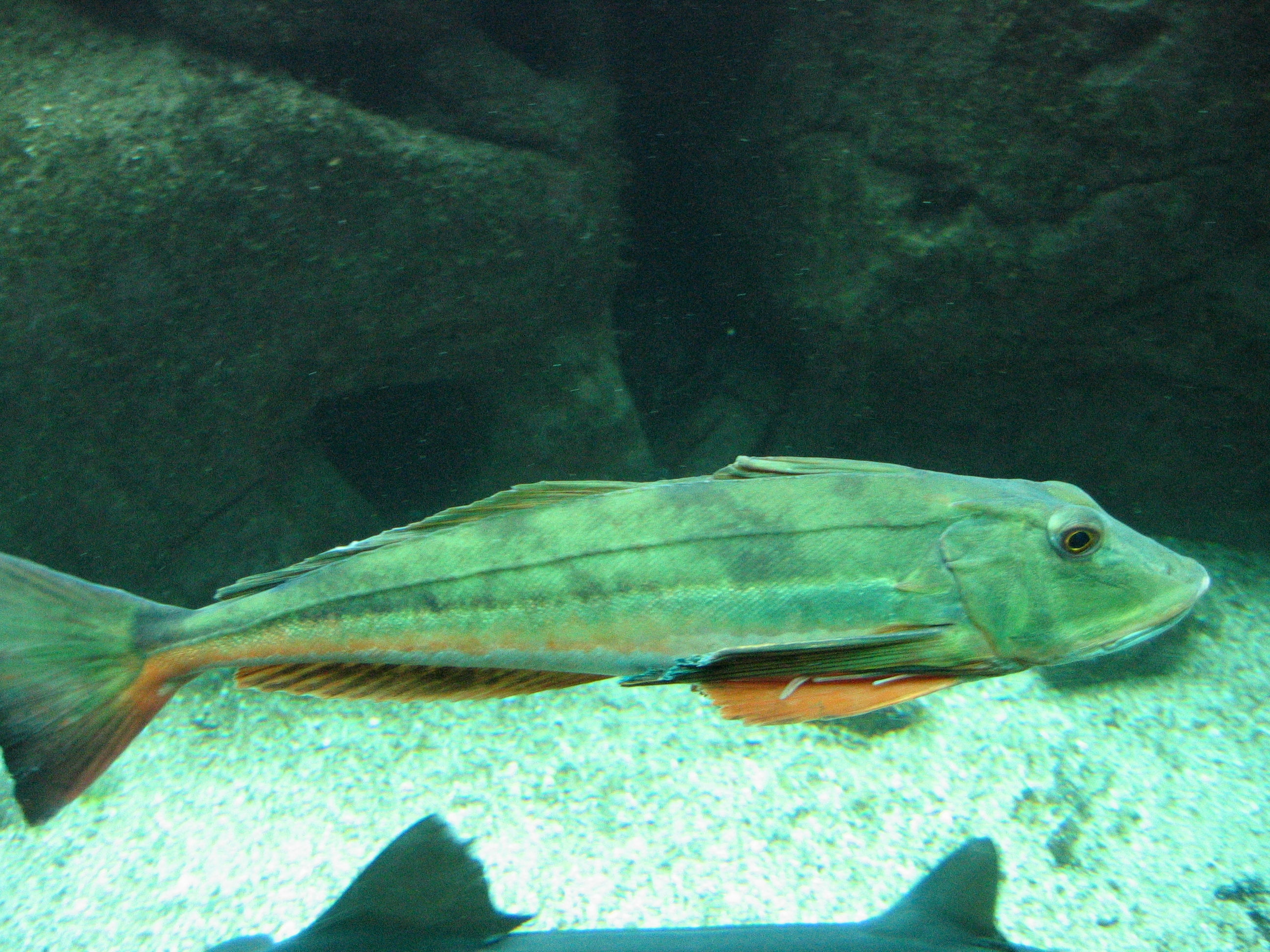 Les aquariums Océanopolis, Brest : Chelidonichthys lucernus – Grondin perlon